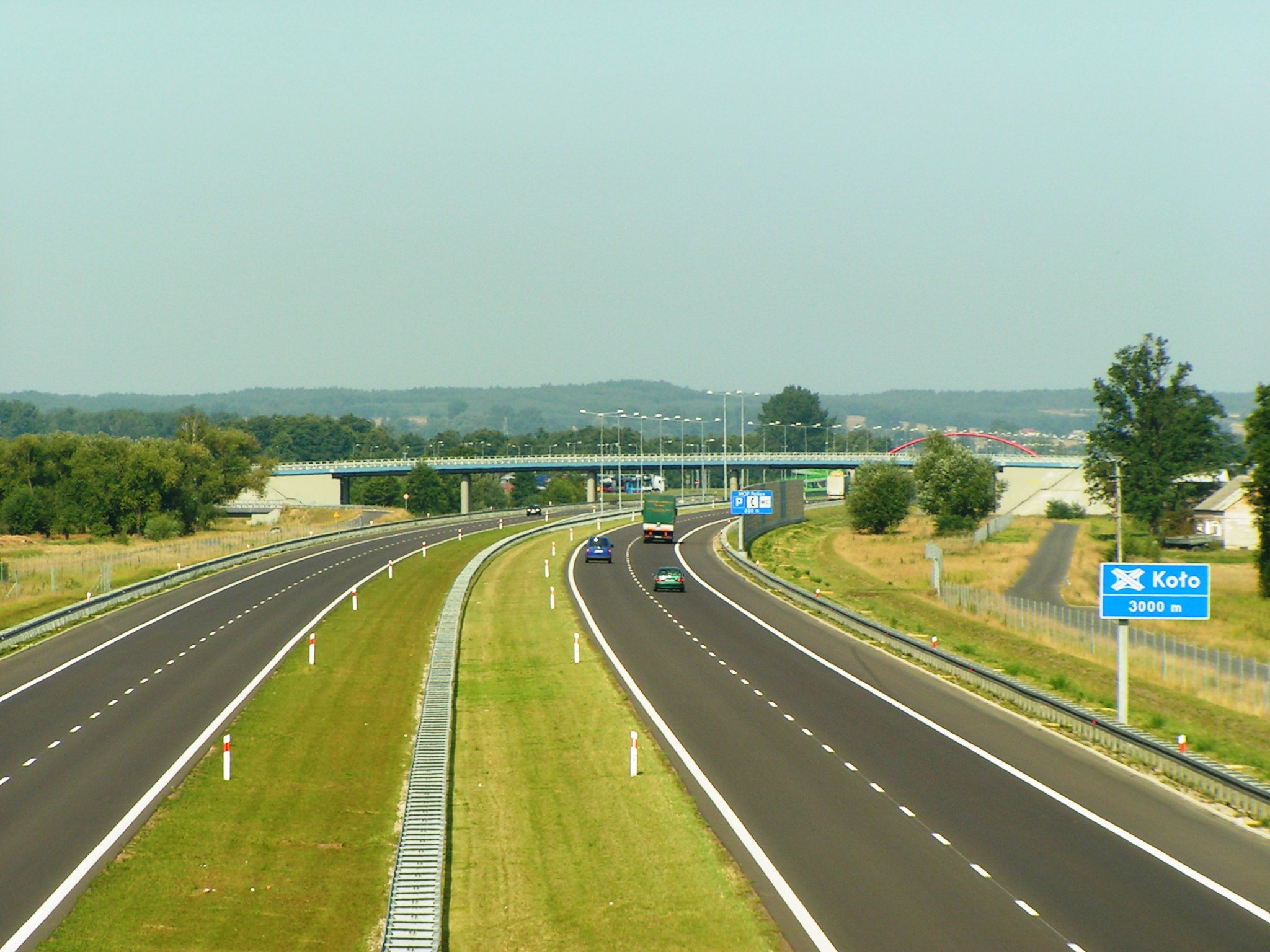 Autostrada A2 w okolicach wsi Police Mostowe w woj. wielkopolskim